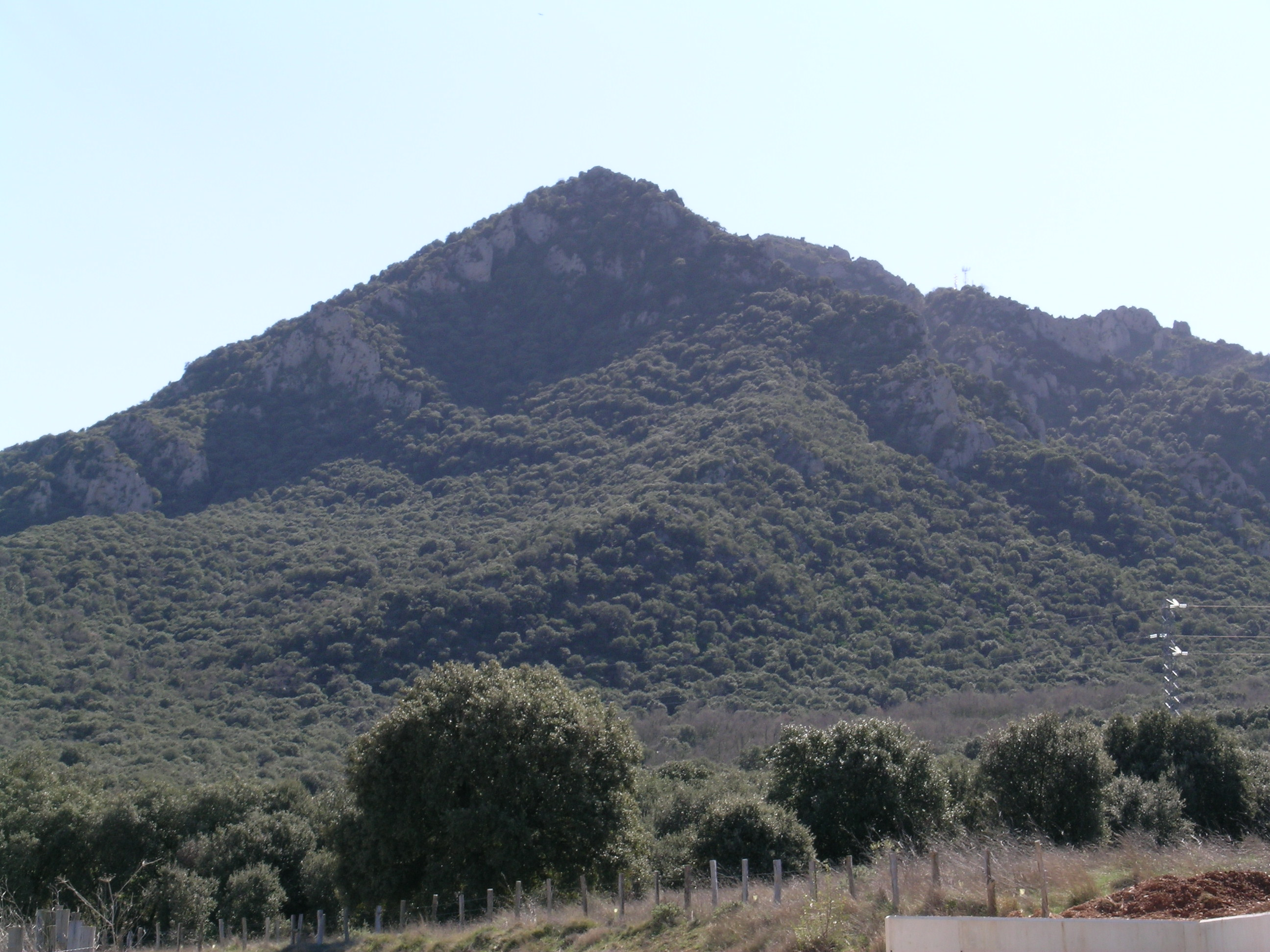 Vista del Montejurra-Jurramendi desde el Monasterio de Irache